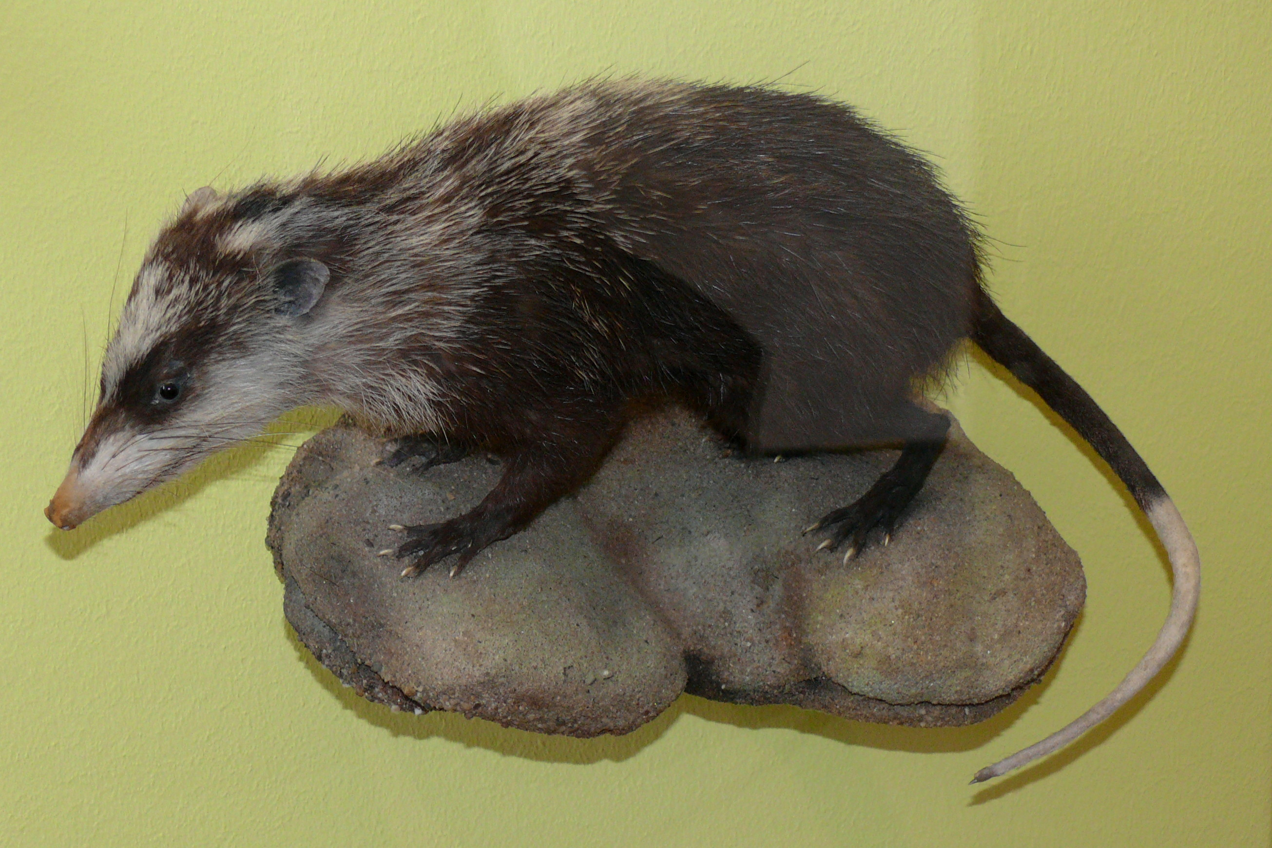 Große Ratten- oder Haarigel (Echinosorex gymnura)